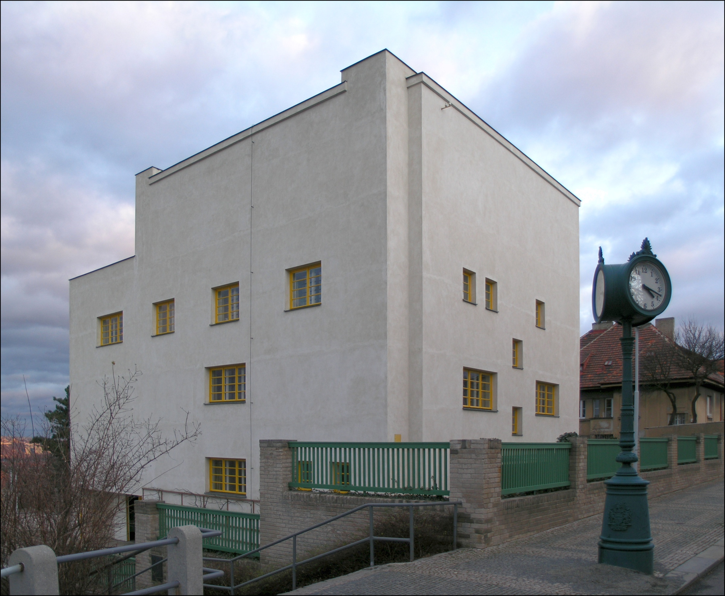 Müllerova vila